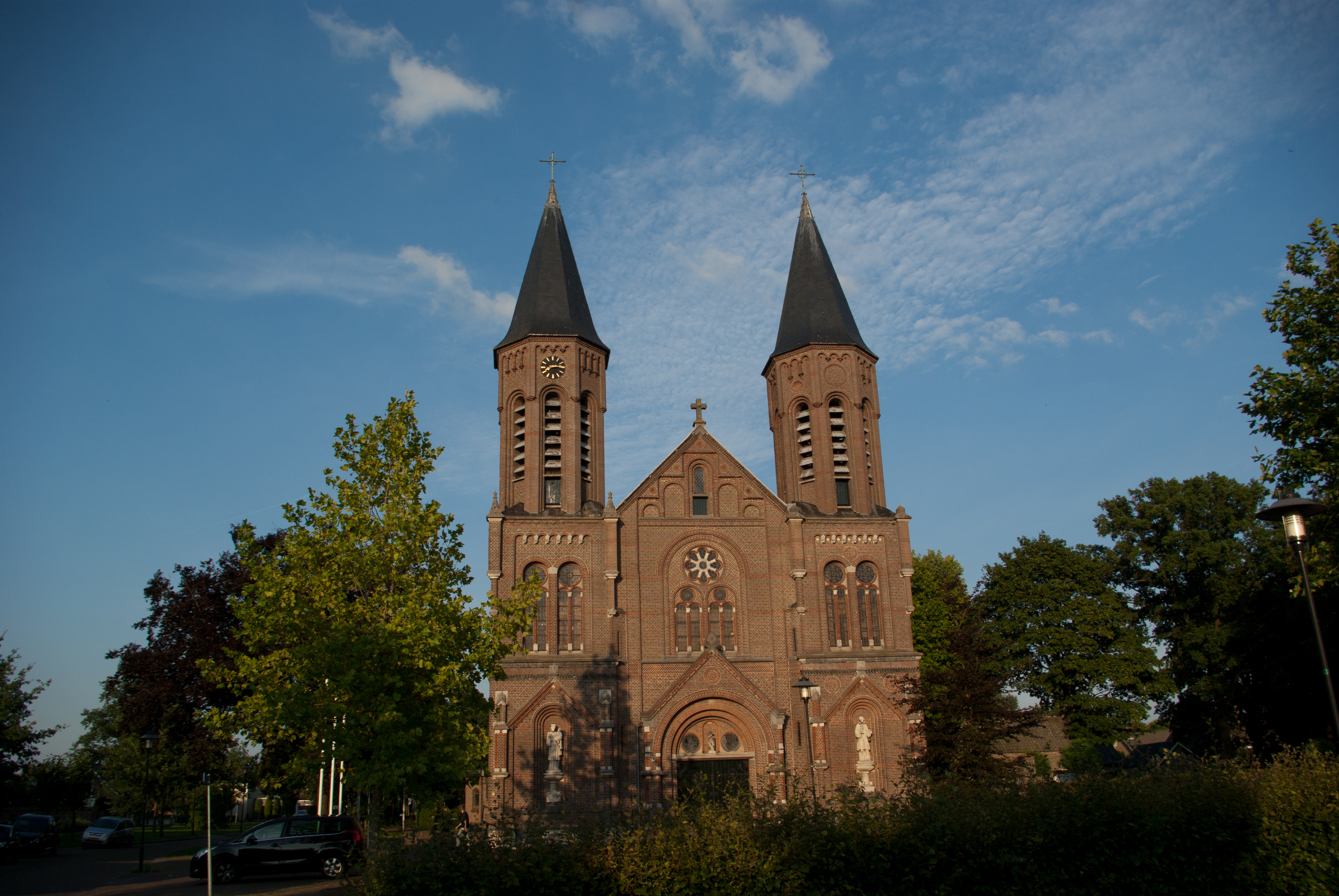 Zicht op een deel van de Heilige Martelaren van Gorcumkerk in de Erasstraat